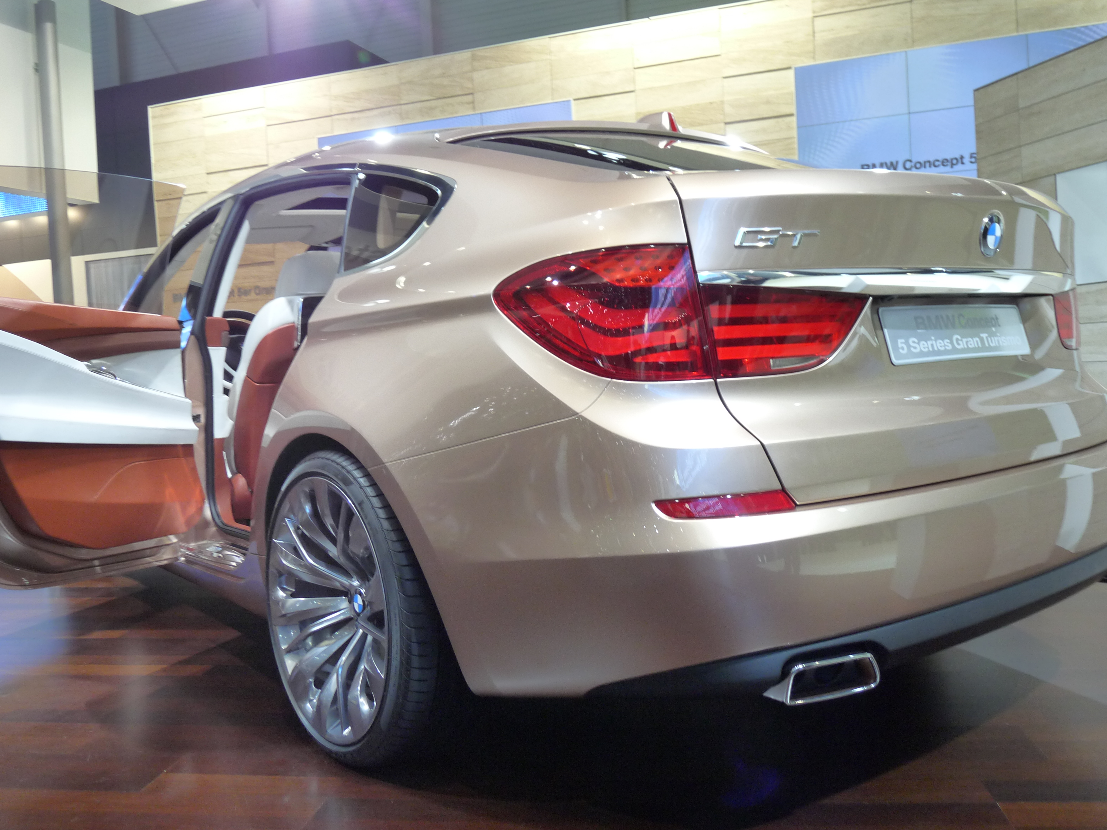 BMW Série 5 GT au Salon de Genève 2009